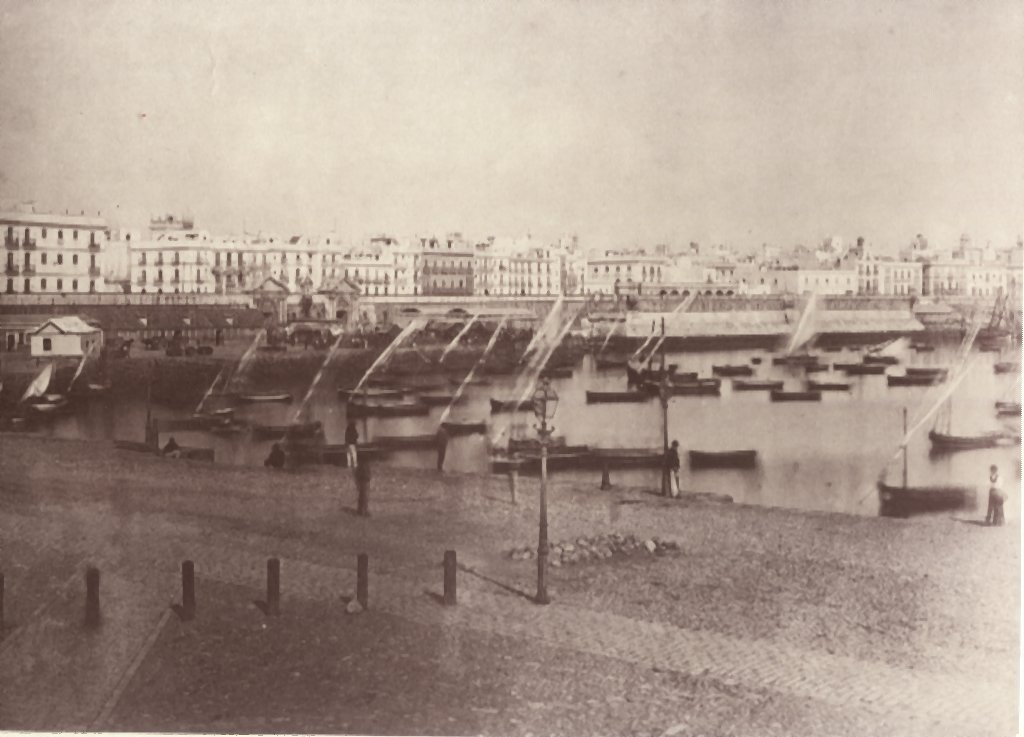 El puerto de Cádiz visto desde la estación de FFCC en el siglo XIX. Se puede ver la Puerta del Mar